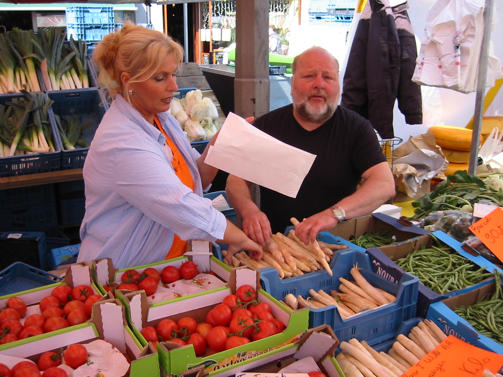 Eigen foto. GerardM 24 apr 2004 07:29 (CEST)